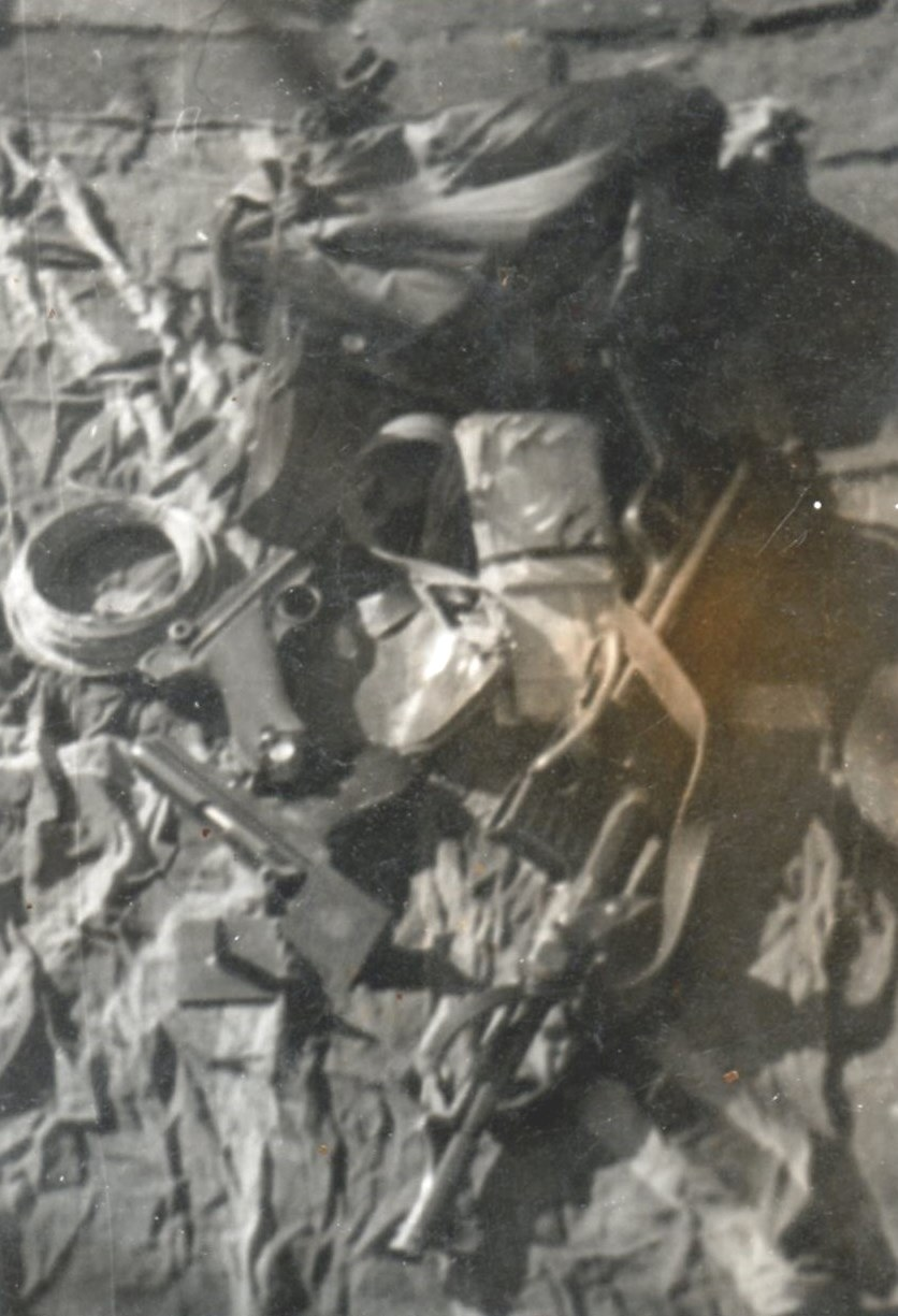 Granát 48